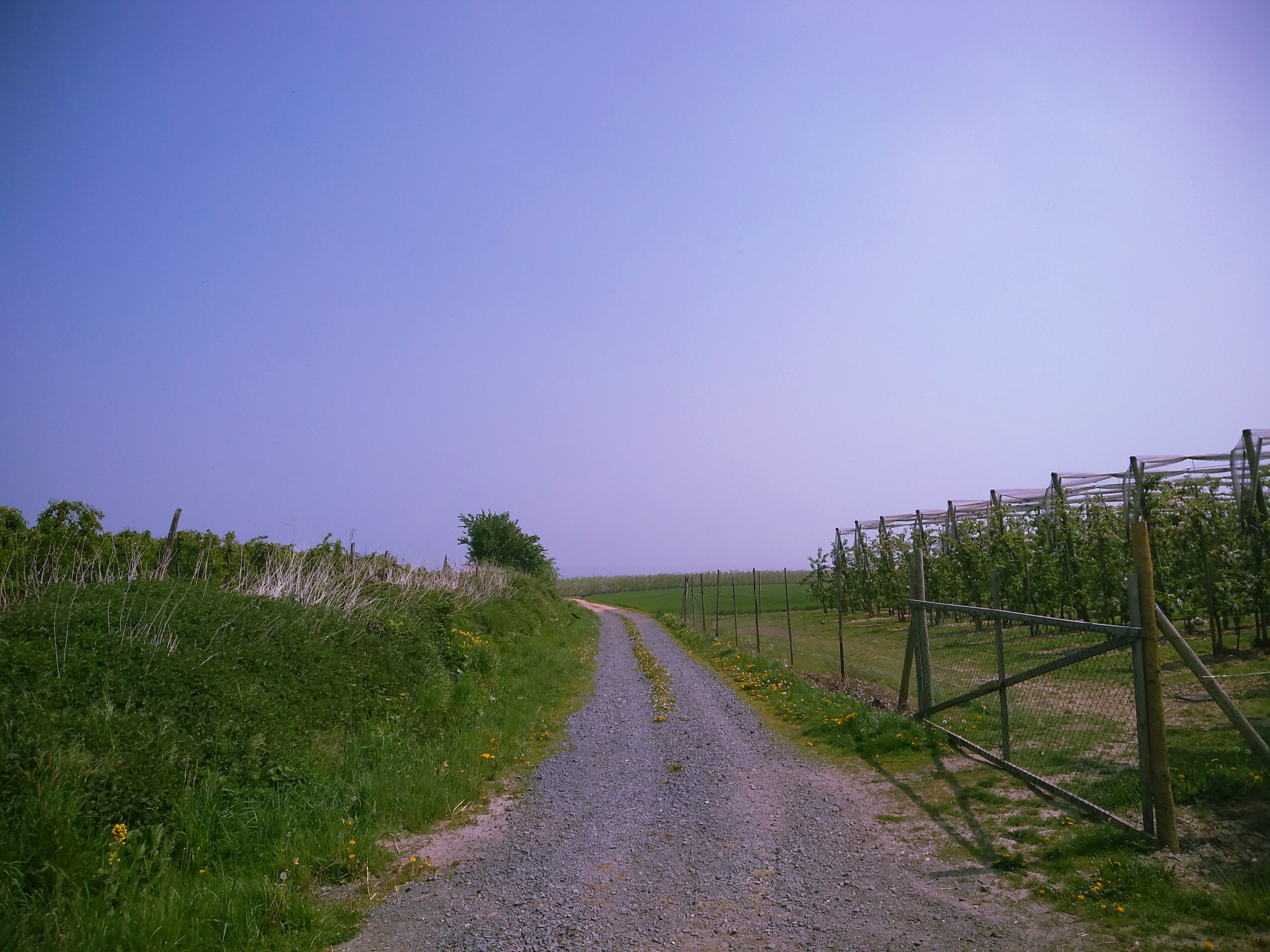 Die Aachen-Frankfurter Heerstraße (oder Krönungsstraße) verlief von Frankfurt am Main nach Aachen und wurde zur karolingischen Zeit angelegt. Ihren höchsten Punkt (rd. 260 m ü.N.N.) erreicht sie bei Fritzdorf. Die einst bedeutsame Straße ist heute in den Örtlichkeiten kaum noch erkennbar.